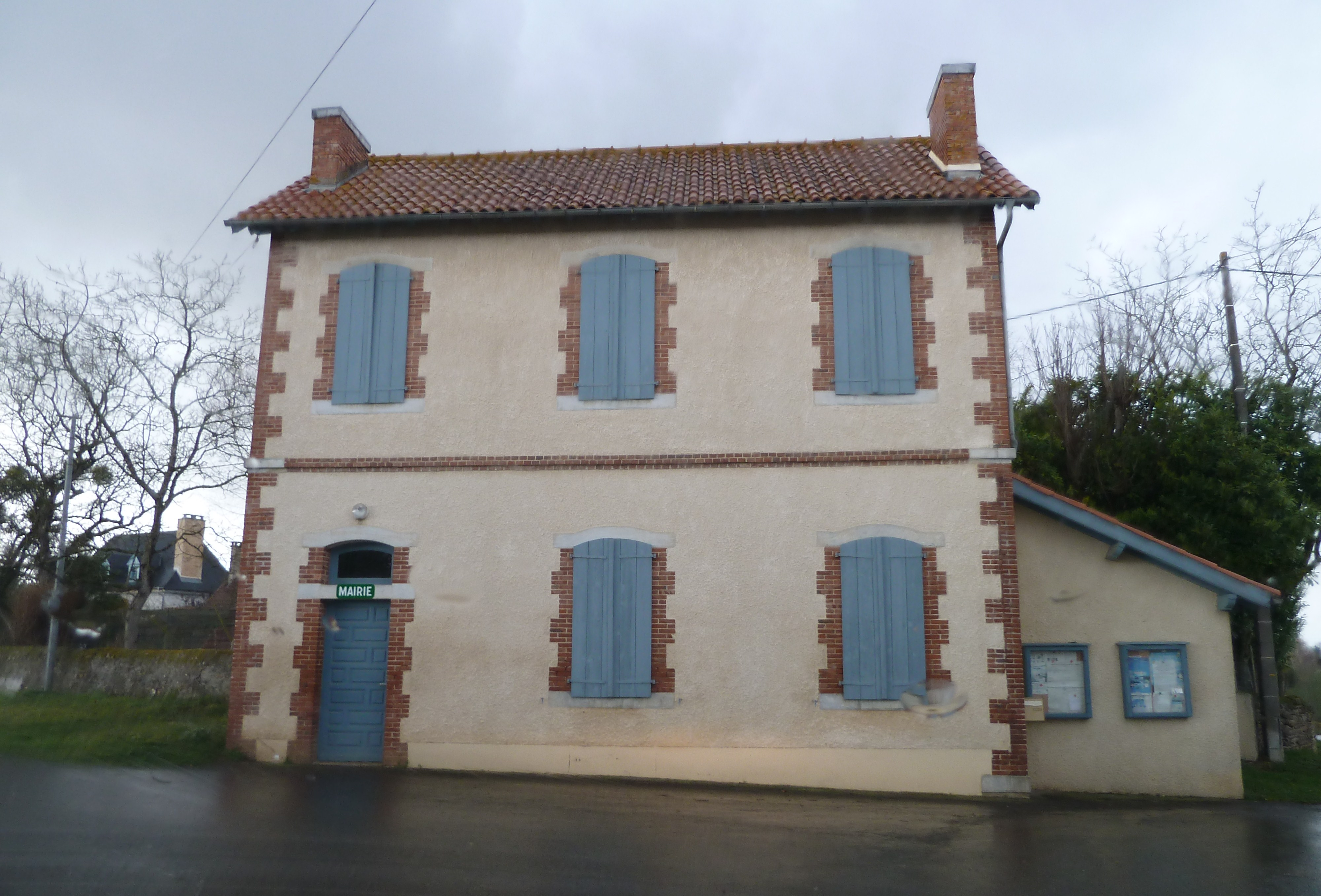 Mairie d'Urost